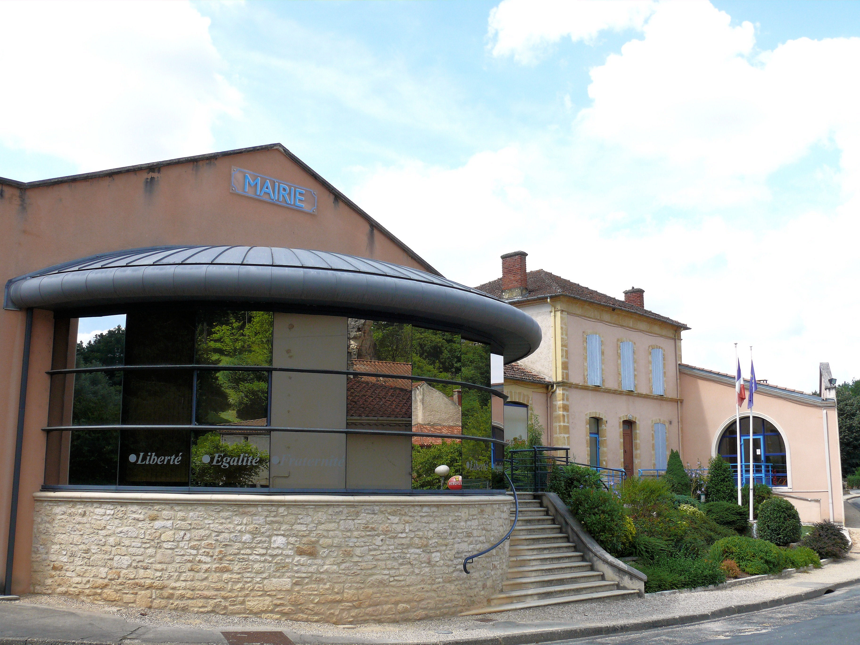 Cuzorn - Mairie